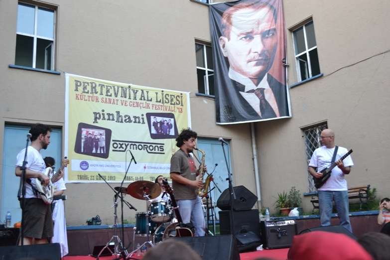 Pertevniyal Lisesi Gençlik Festivali "Pinhani Sahnede"